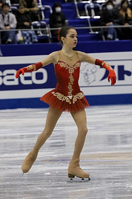 Евгения Медведева на Финале Гран При 2013 - Короткая программа